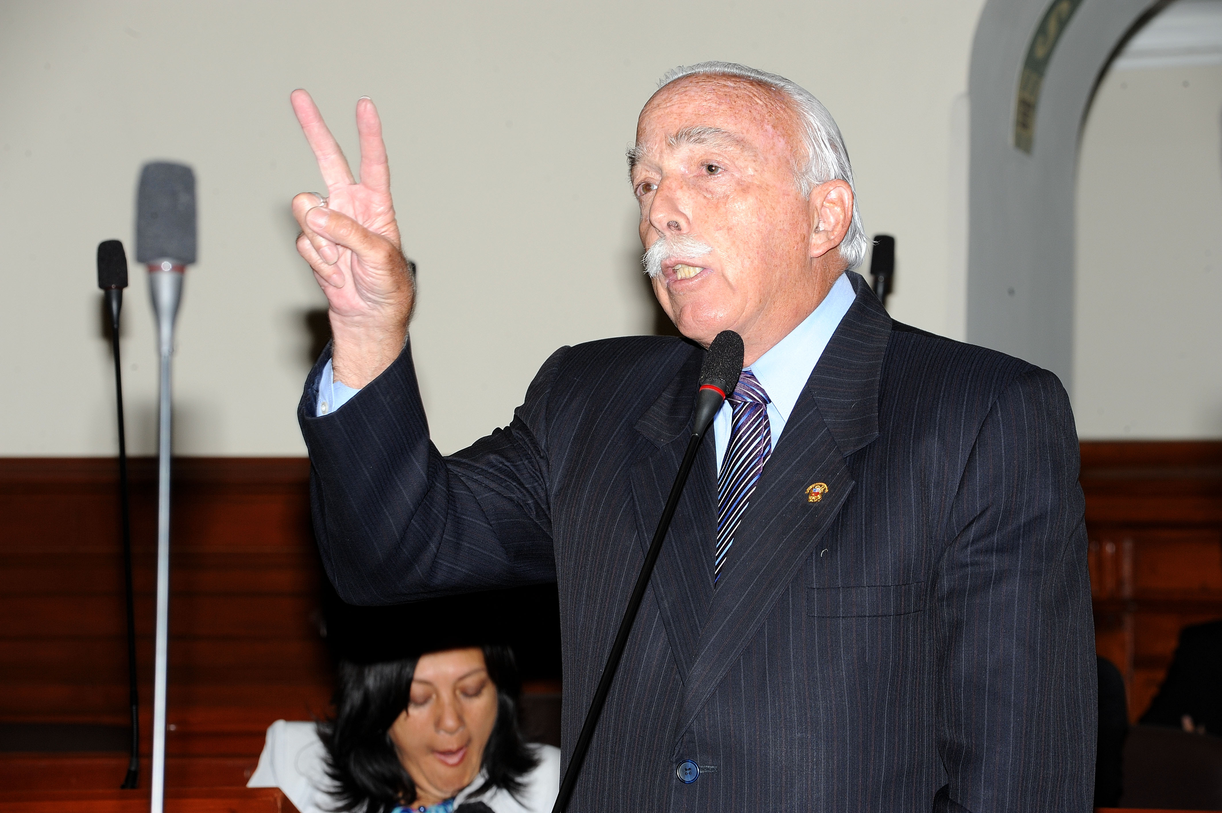 El legislador Carlos Tubino durante su intervención en el debate parlamentario realizado esta mañana por el Pleno congresal.